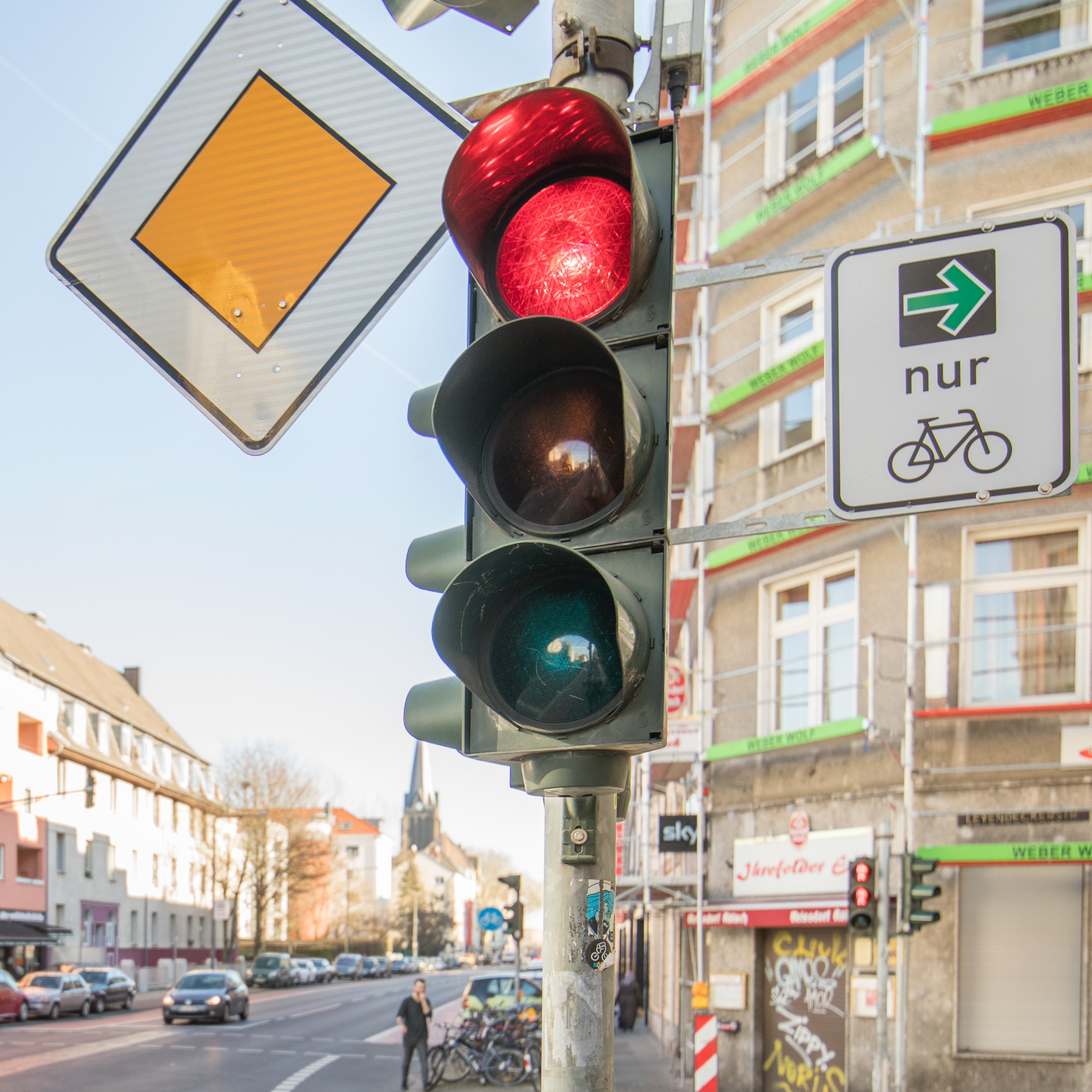 Grünpfeil nur für Radfahrer, Pilotprojekt in Köln. Kreuzung Subbelrather Straße/Leyendeckerstraße, Köln-Ehrenfeld